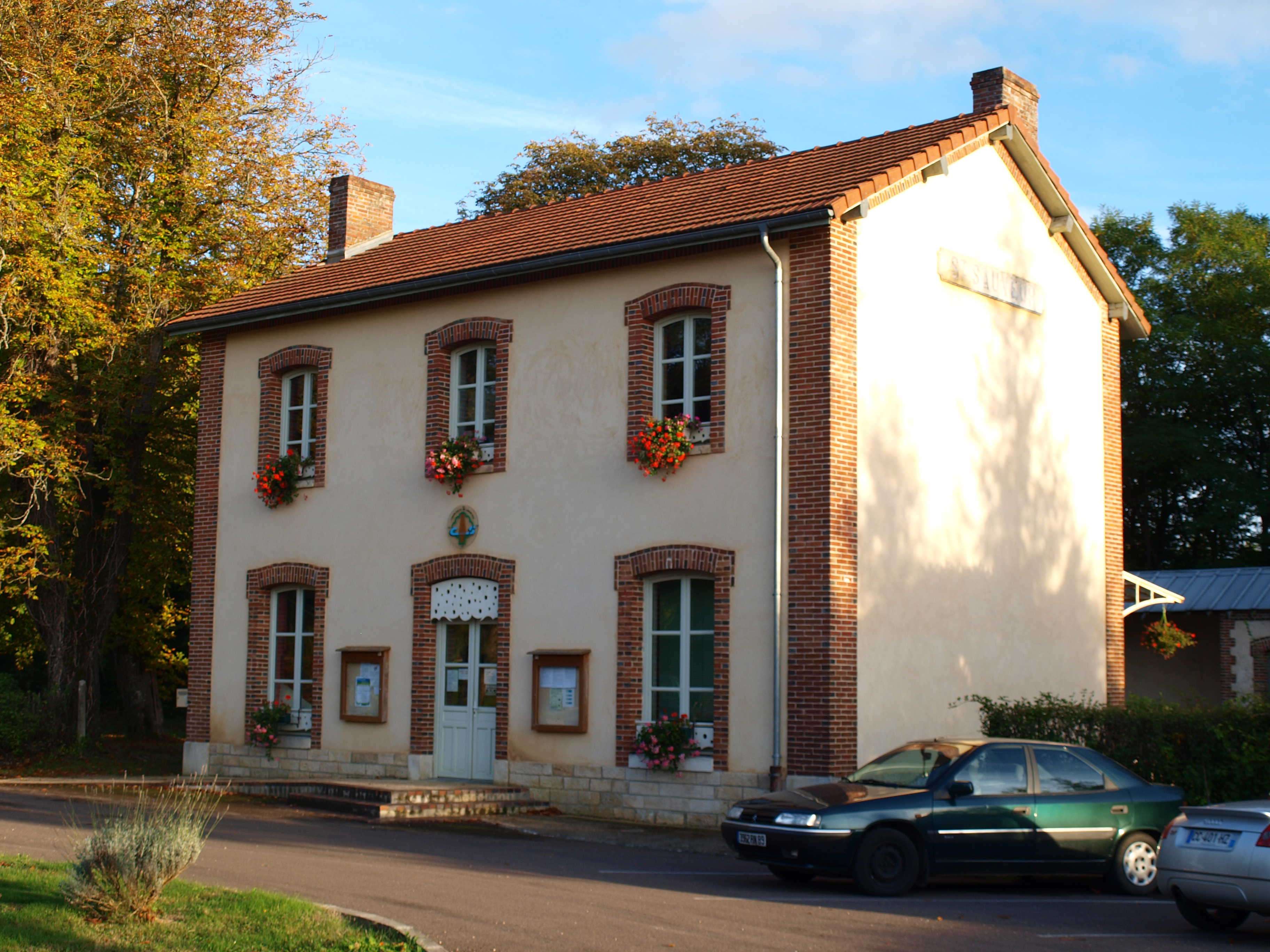 Saint-Sauveur-en-Puisaye (Yonne, France) ; l'ancienne gare, aujourd'hui le siège de la communauté de communes.